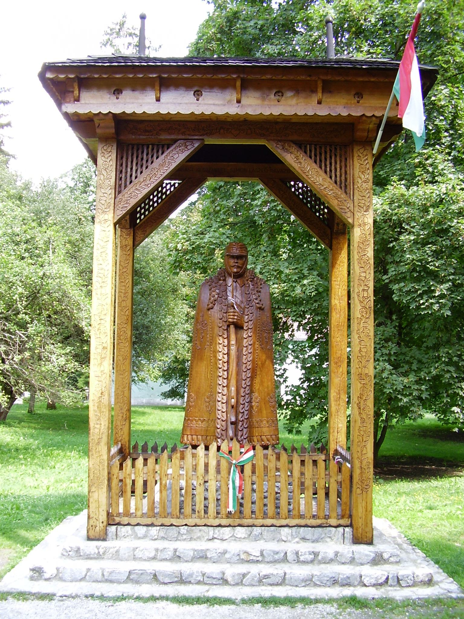 A Kárpátok őre szobrot 2002. november 17-én avatták fel. Horváth Béres János szobrász és Tóth Vásárhelyi József építész alkotása a Szalajka-völgyben, Szilvásvárad kapujában áll, fából faragták.